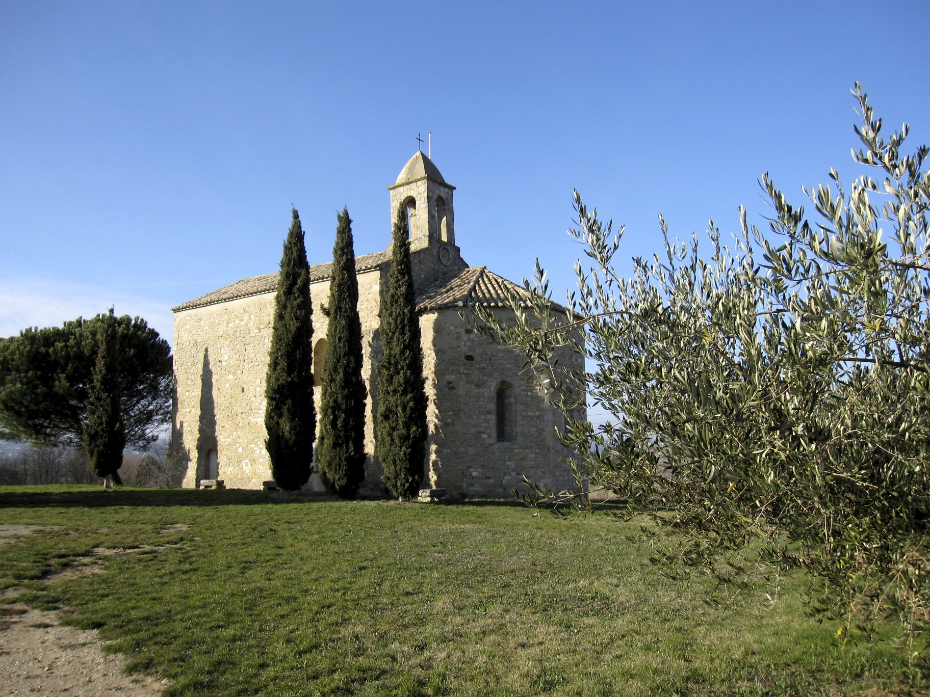 Chapelle Sainte-Agnès de Saint-Paulet-de-Caisson, Gard, France